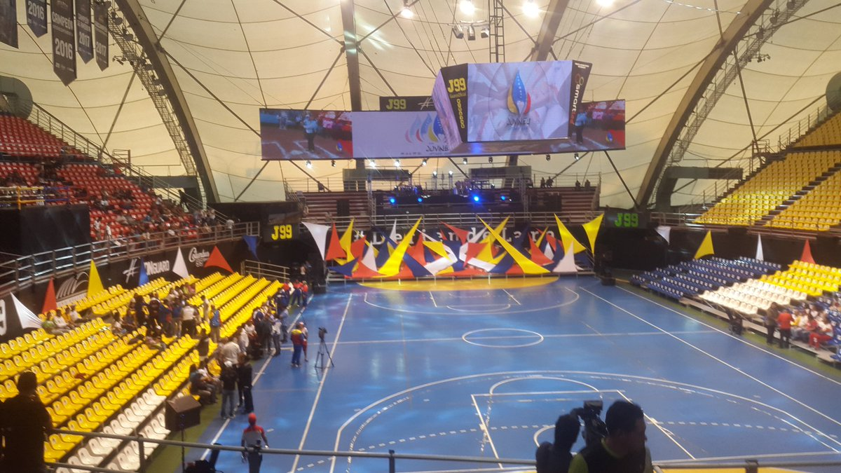 Domo Bolivariano Juvines 2017